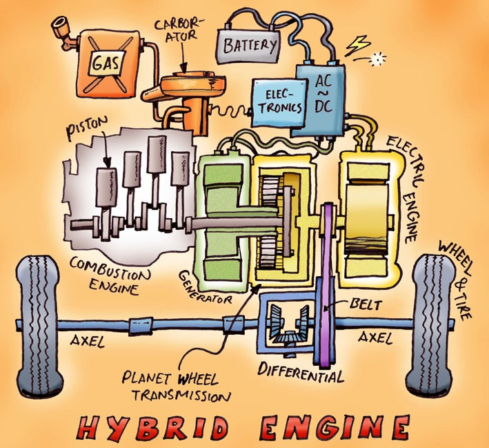 Opengewerkte tekening van hybride motor, getekend door Peter Welleman